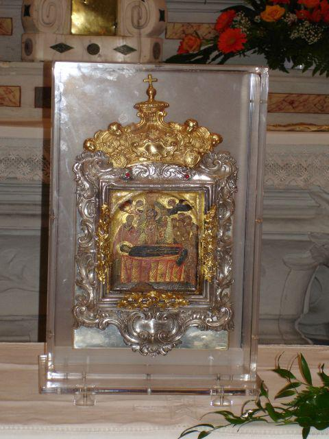 L'esposizione ai fedeli del quadretto bizantino presso il santuario di Nostra Signora di Montallegro, Rapallo, Liguria, Italia